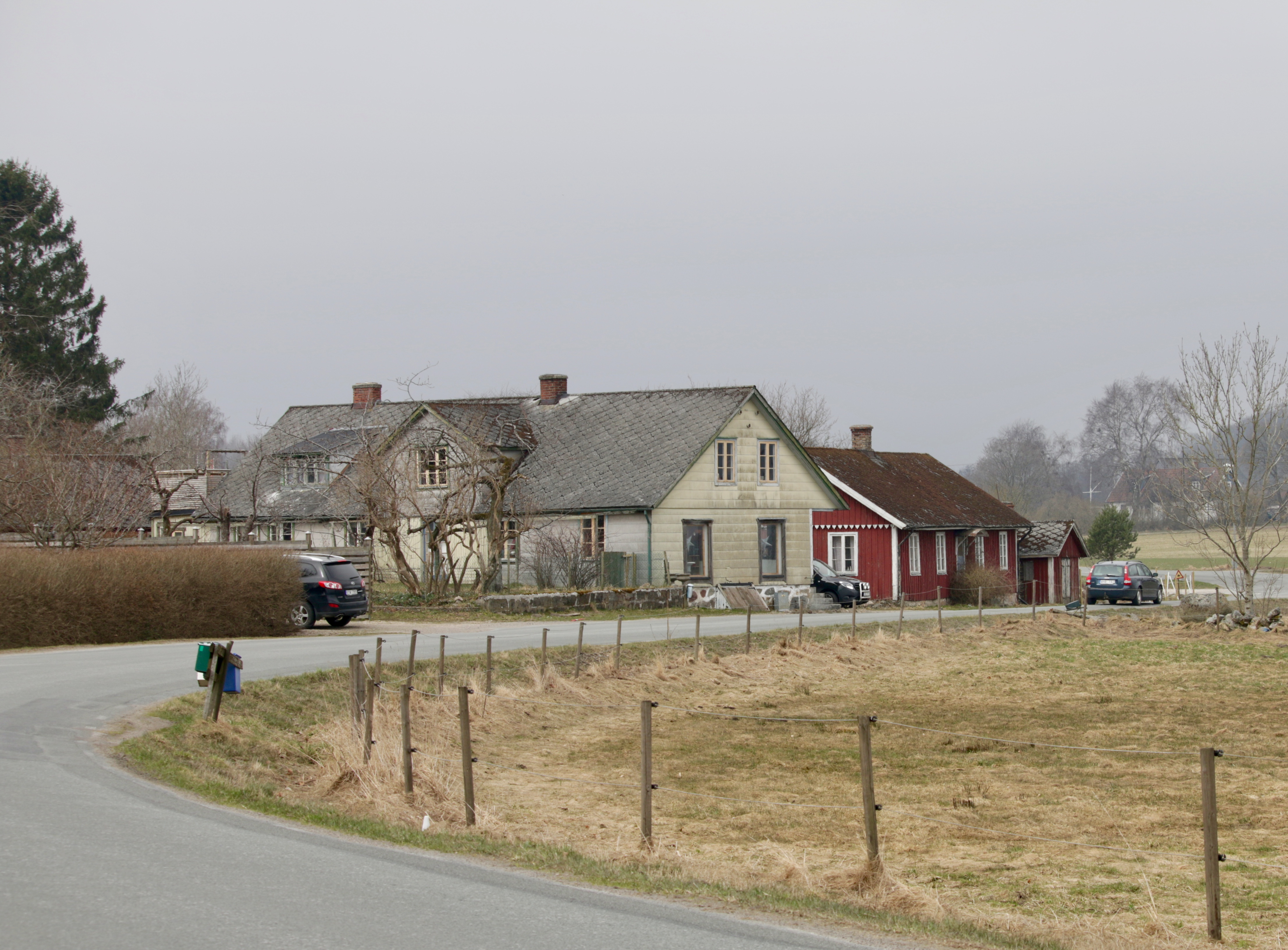 Norra Björstorp